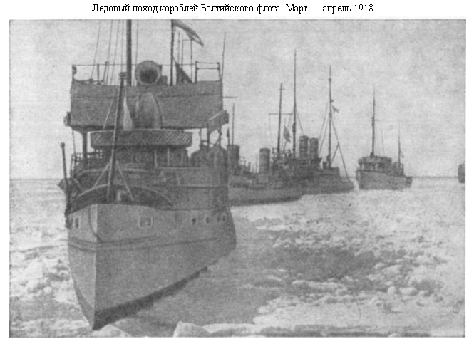 Ледовый поход кораблей Балтийского флота. Март — апрель 1918.